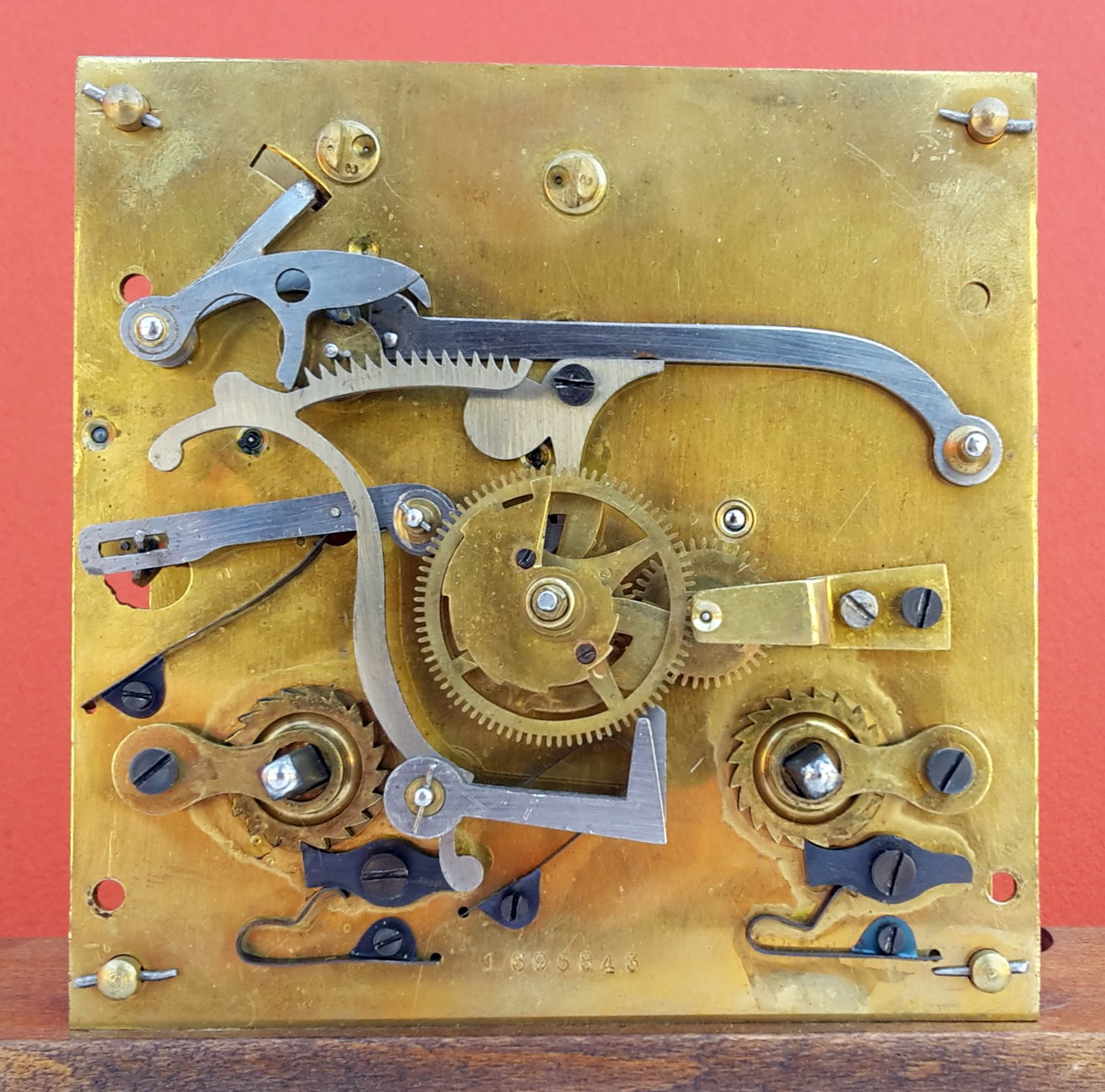 Rechenschlagwerk einer Wanduhr